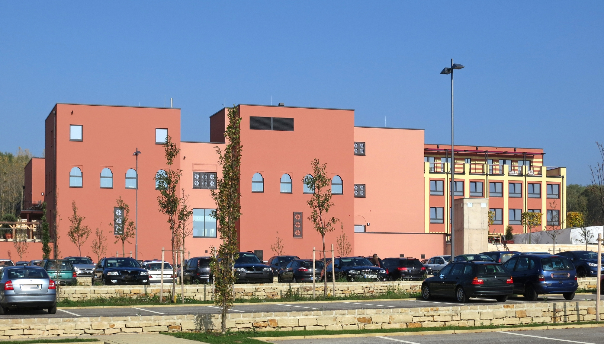 Die Saarlandtherme in Rilchingen.